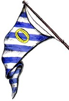 Bandera de la localidad de Ostende en el Partido de Pinamar (Buenos Aires, Argentina).